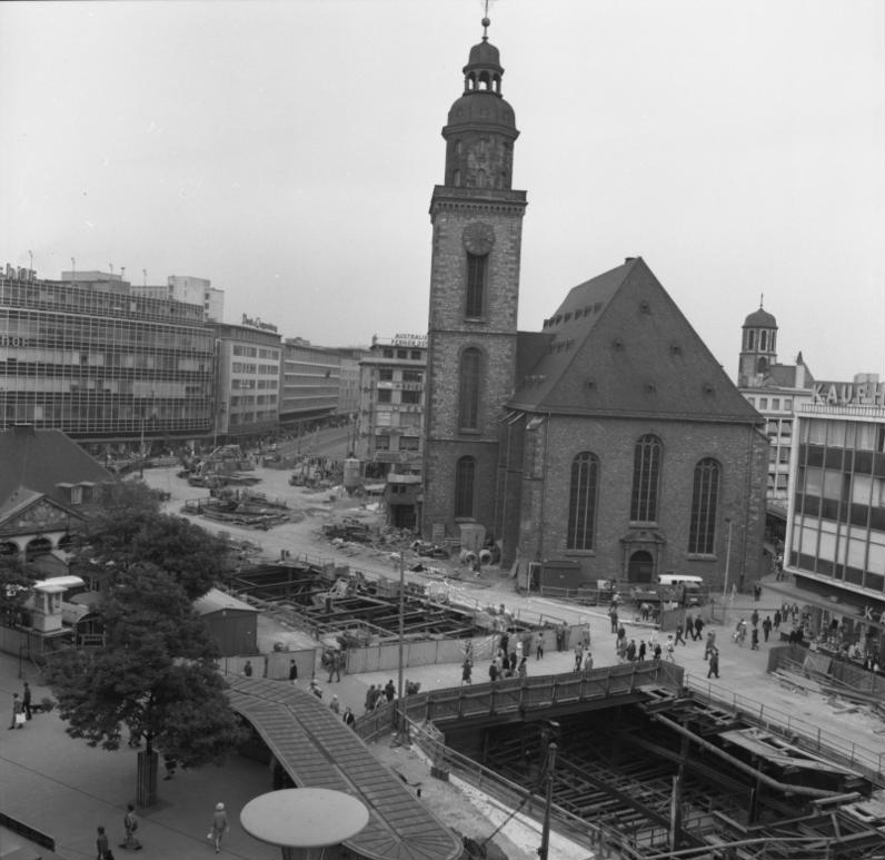 Frankfurt am Main U-Bahn-Bau